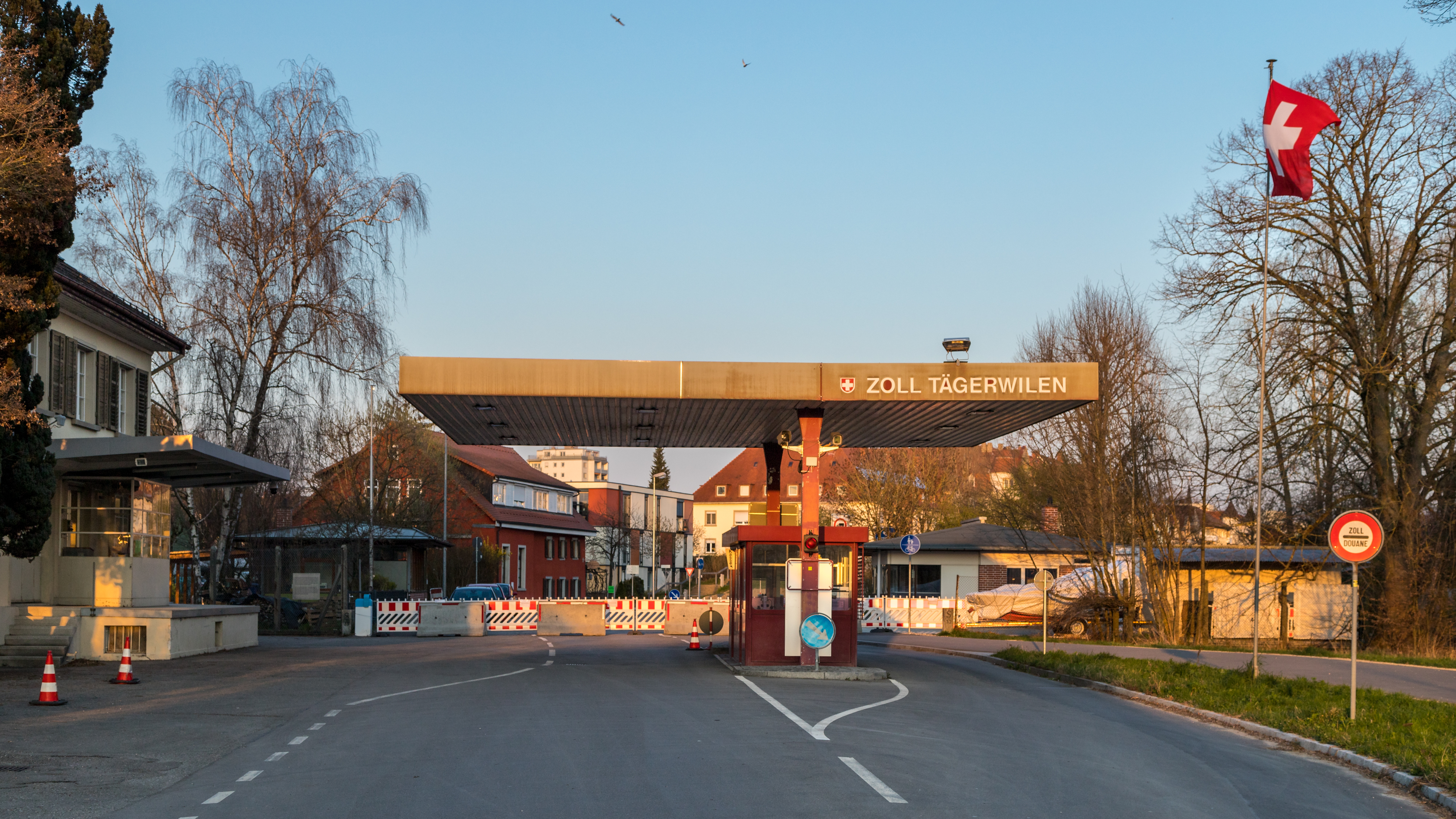 Seit Mitte März 2020 ist der Zoll Tägerwilen wegen des Coronavirus geschlossen und die deutschen Nachbarn und Freunde sind in der Nähe, aber doch so fern.